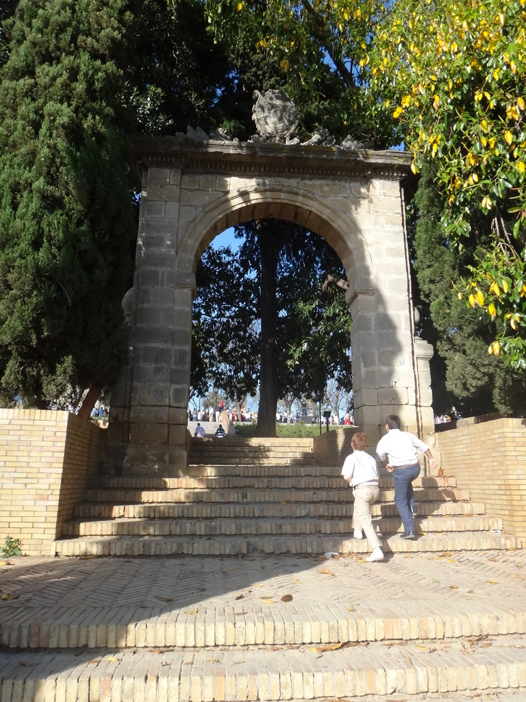 Alameda Vieja, Jerez de la Fra.